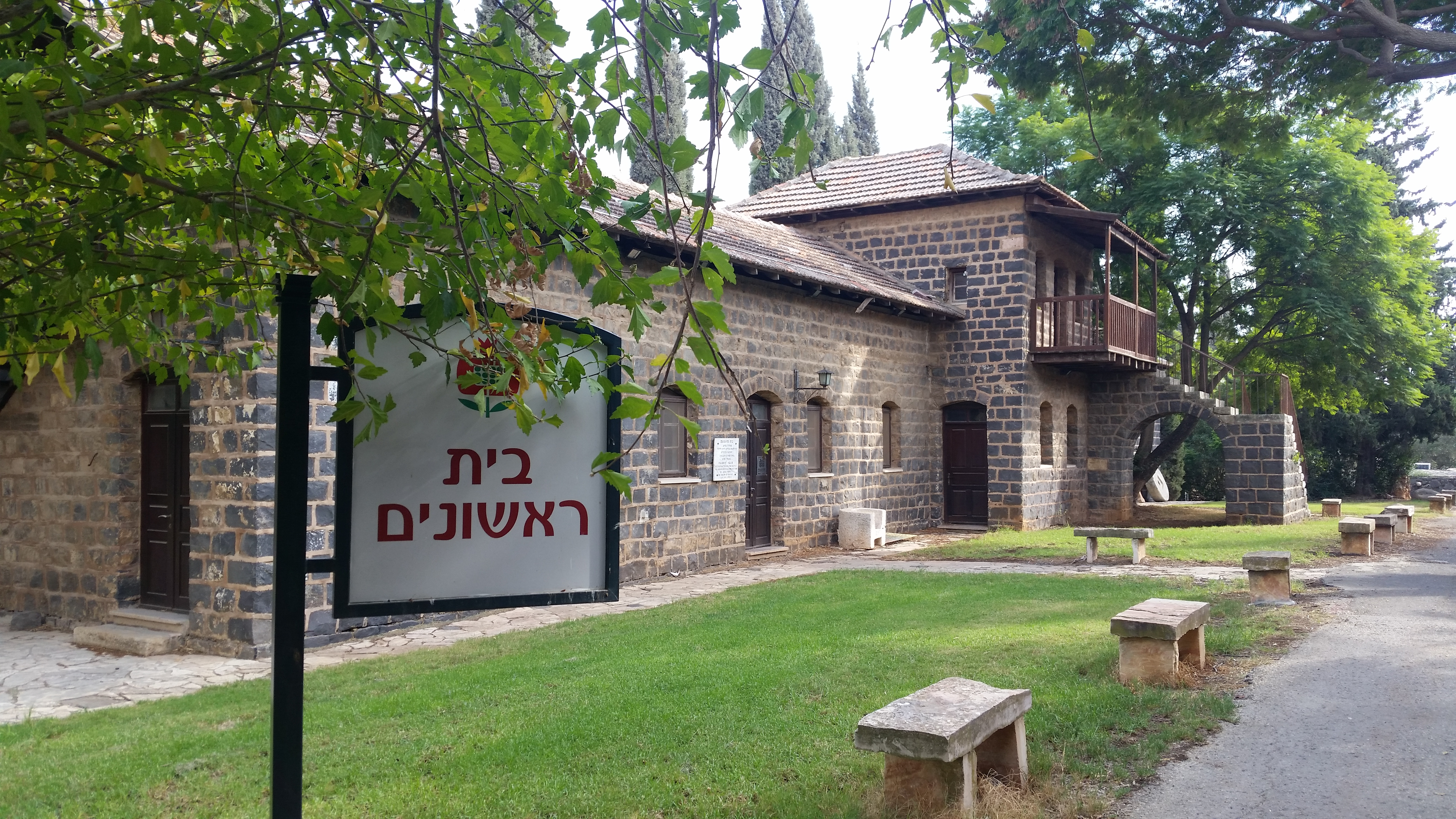 בית ראשנים בכפר גילעדי. המבנה עבר שיקום ומשמש את ארכיון הקיבוץ